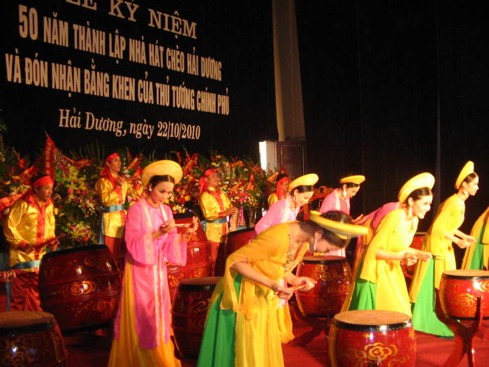 Tiết mục biểu diễn của nhà hát Chèo Hải Dương